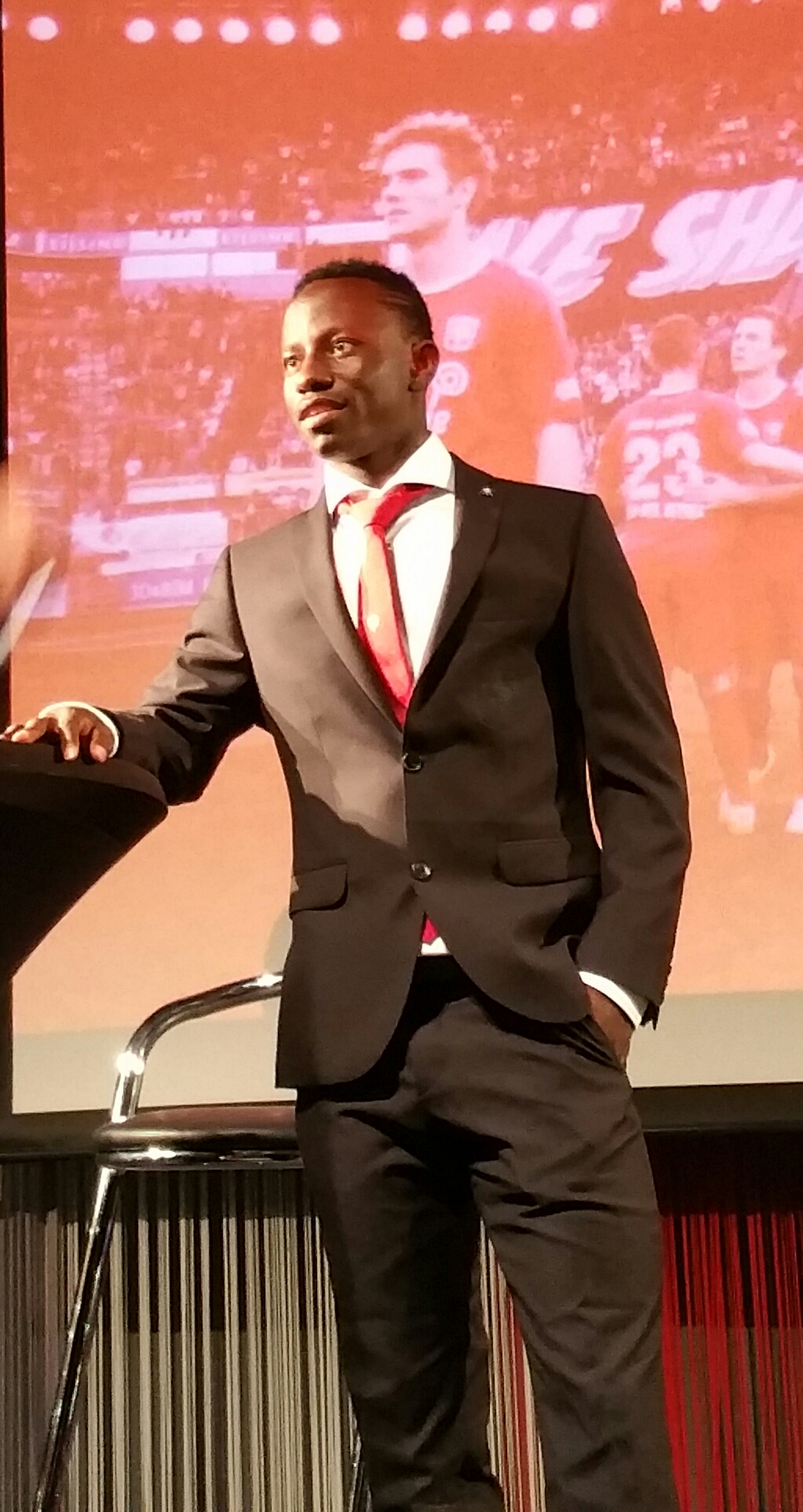 Spelerspresentatie FC Twente 2016/2017